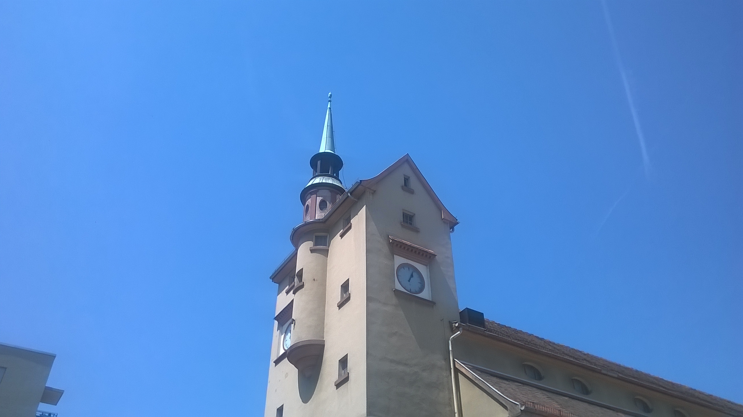 Sozialgebäude und Badehaus Mainstraße 169